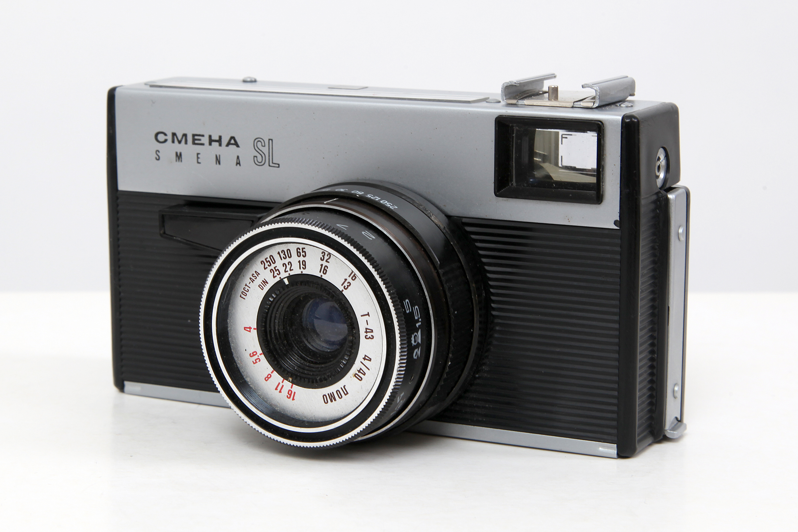 Fotoapparat Smena SL